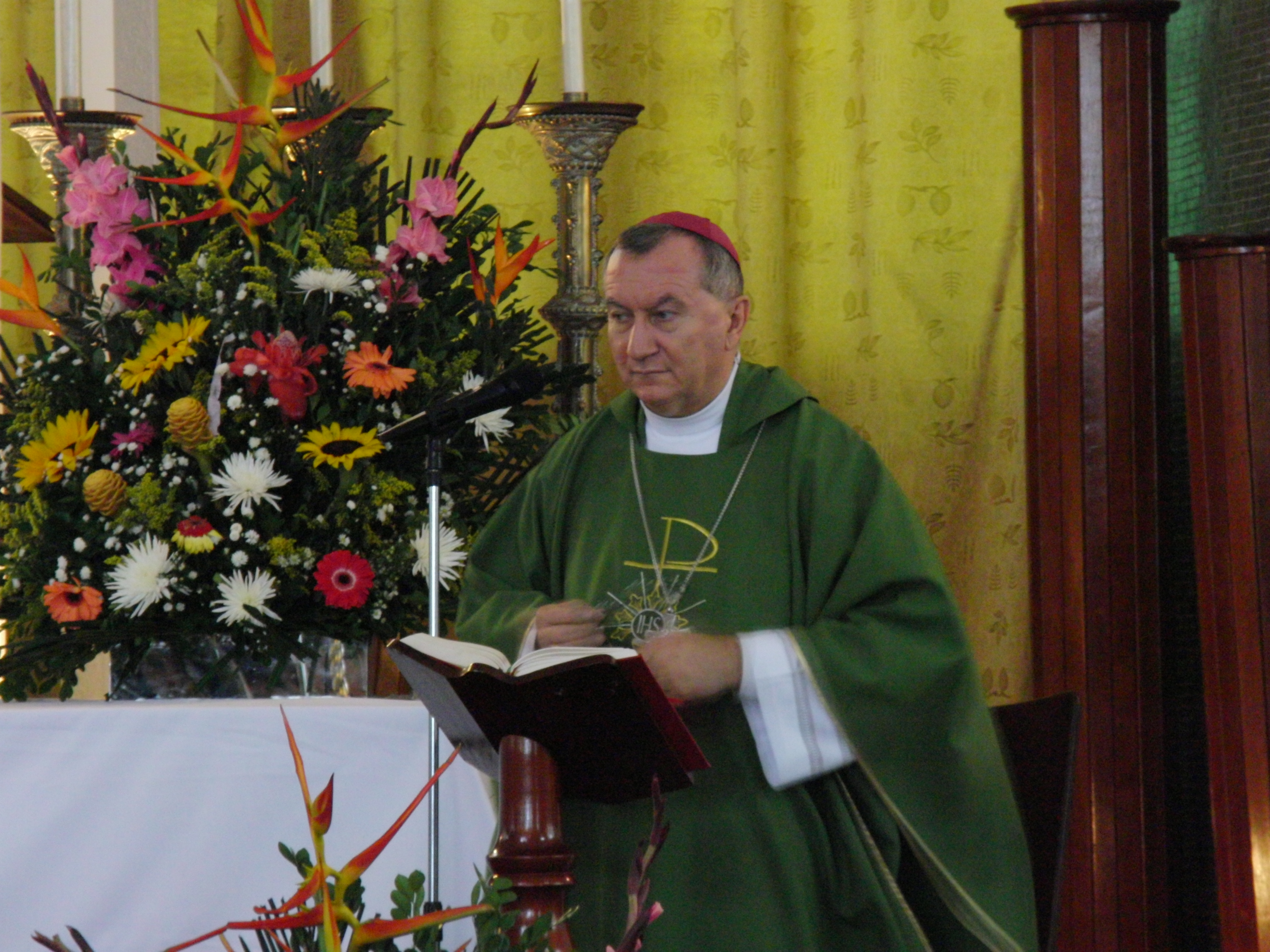 Monseñor Pietro Parolin en una Misa en Caracas, Julio de 2012